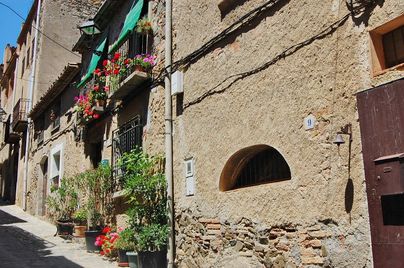 Carrer Major (Torroja del Priorat)